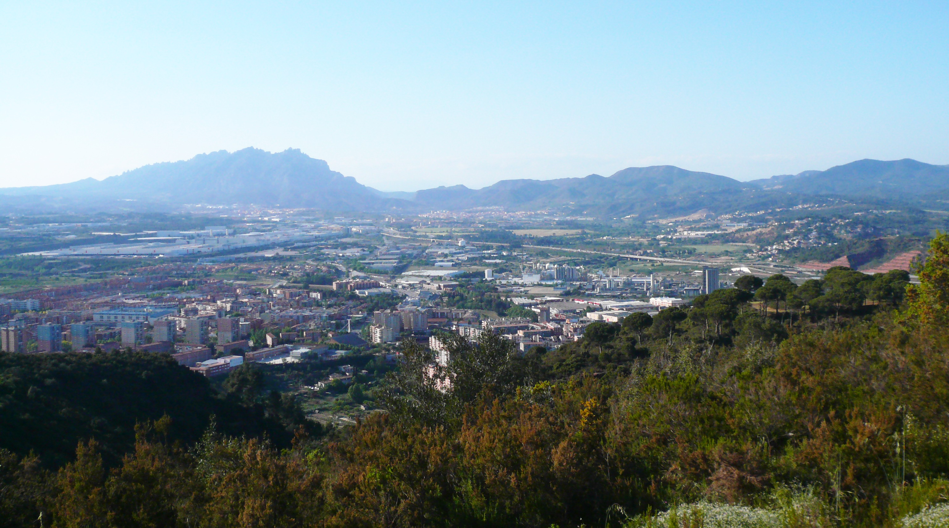 Nord del Baix Llobregat, amb Montserrat al fons i Martorell en primer terme, des de la serra de l'Ataix (Martorell)